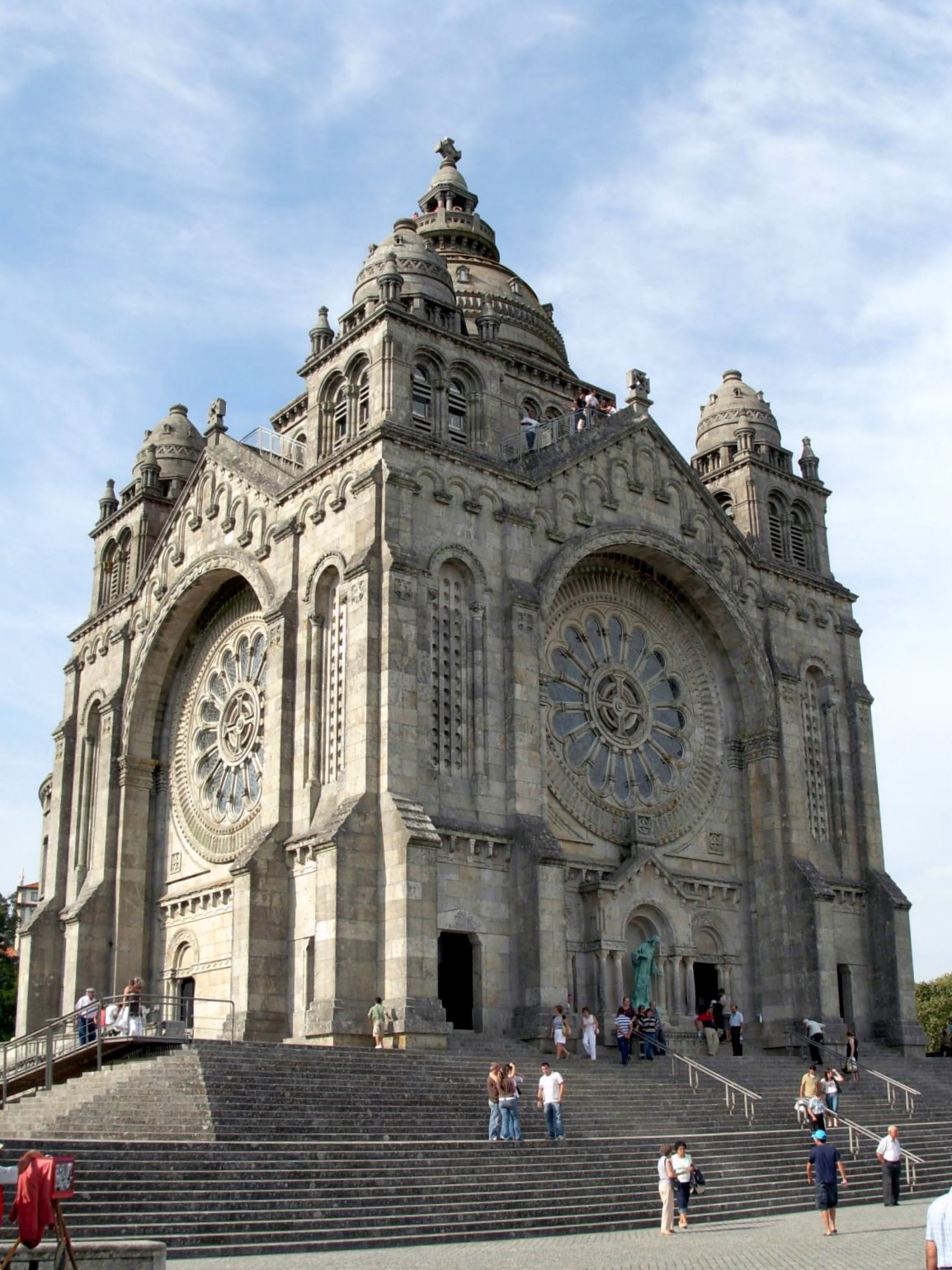 Santa Lucia